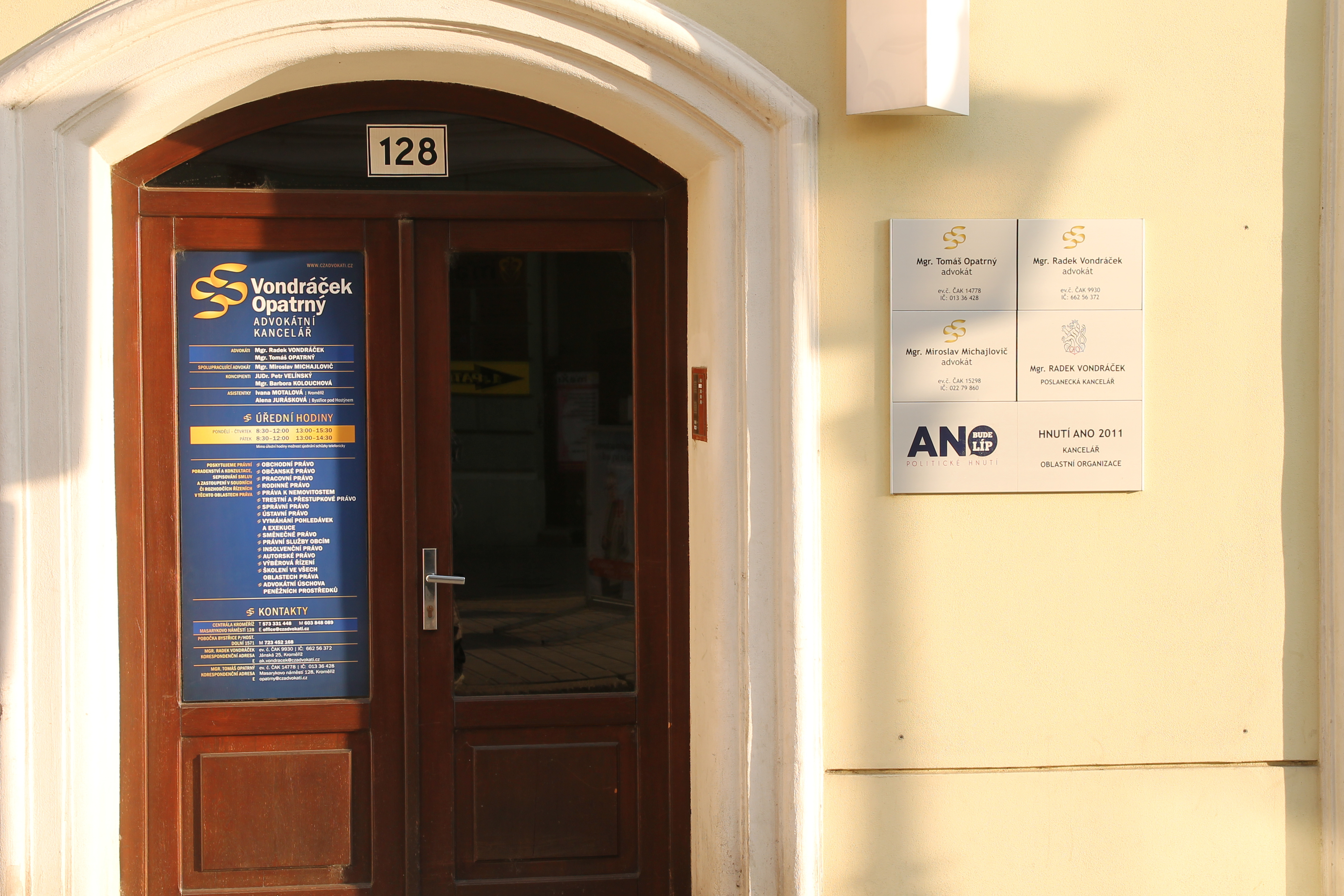 Poslanecká kancelář Radka Vondráčka (ANO), Masarykovo náměstí 128